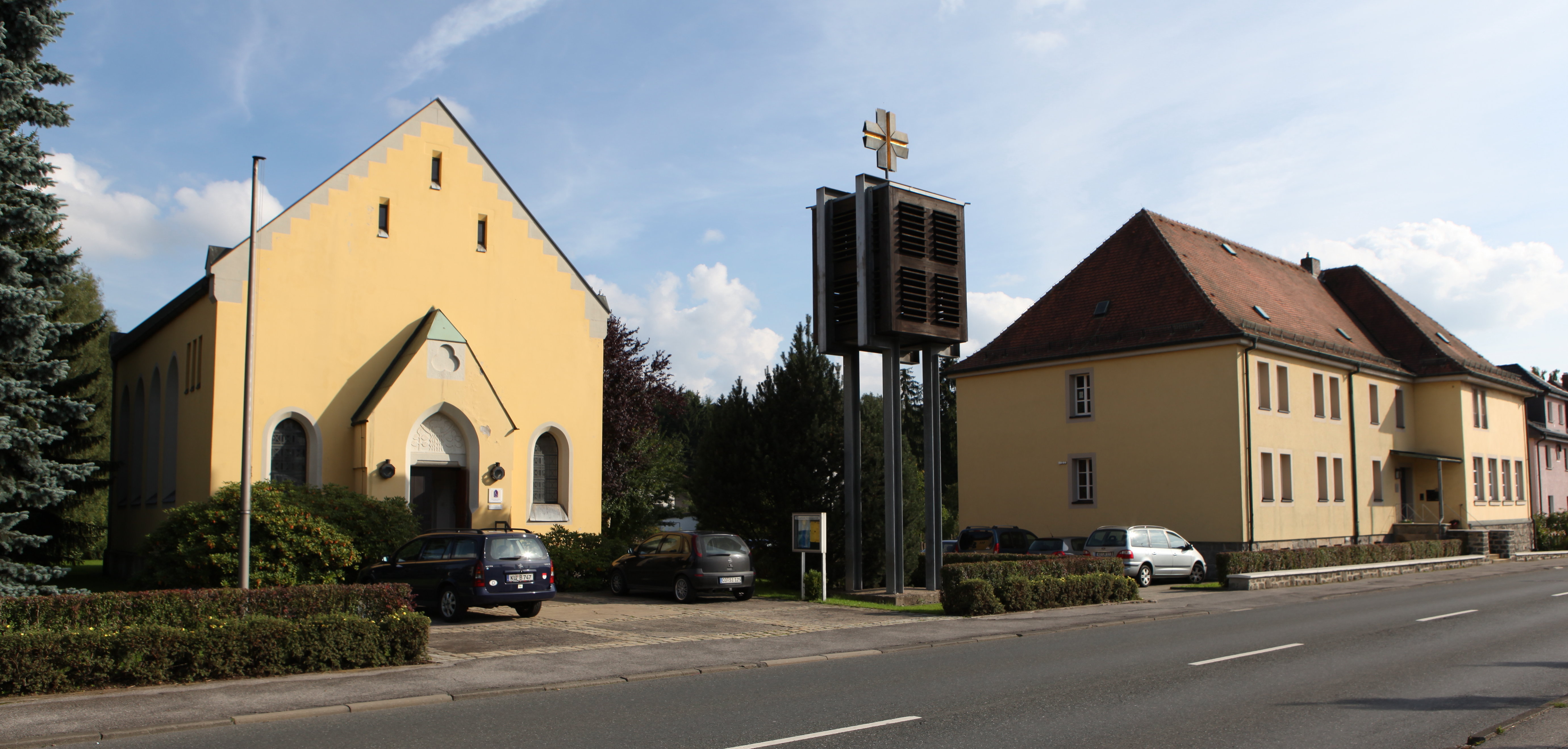 Evangelische Martin-Luther-Kirche in Pressig, Landkreis Kronach